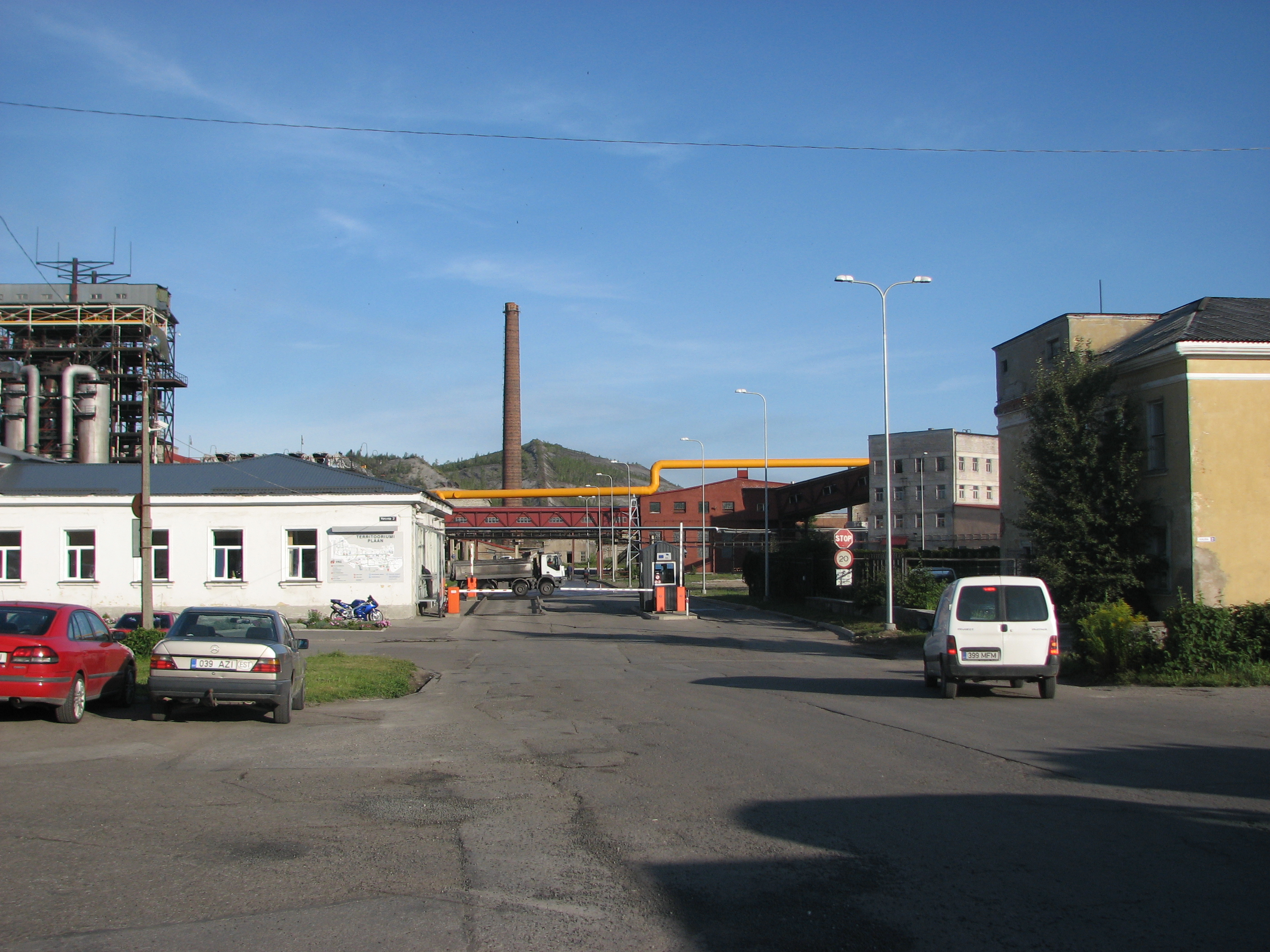 Viru Keemia Grupi tehas